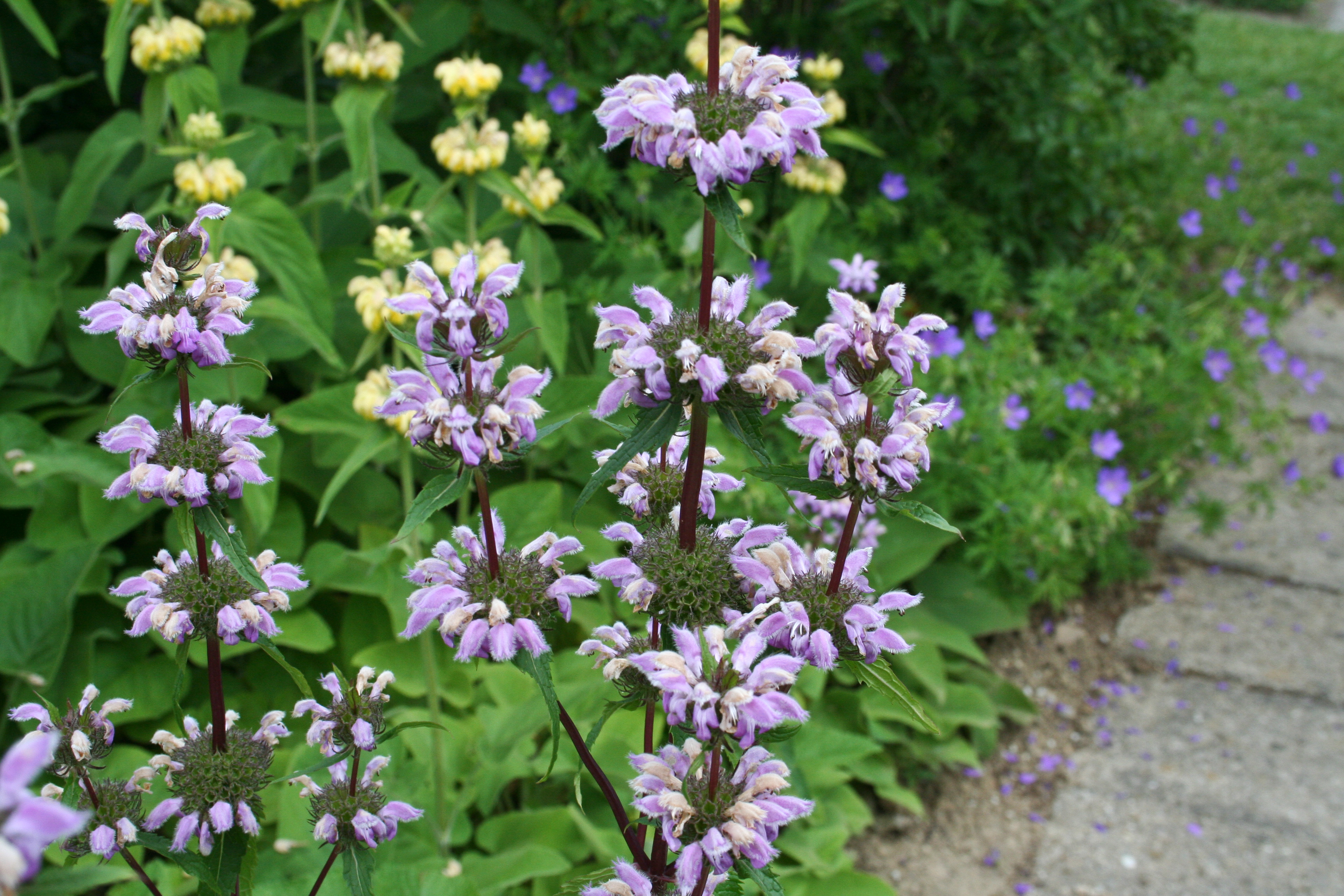 Samos-Bandkraut (Phlomis samia)